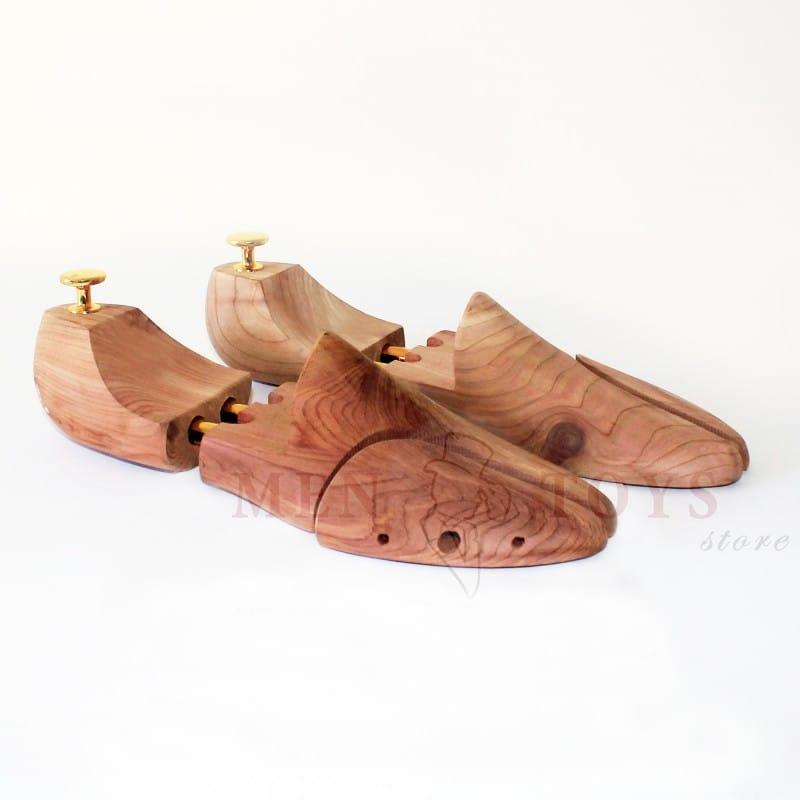 Кедрові формотримачі для взуття